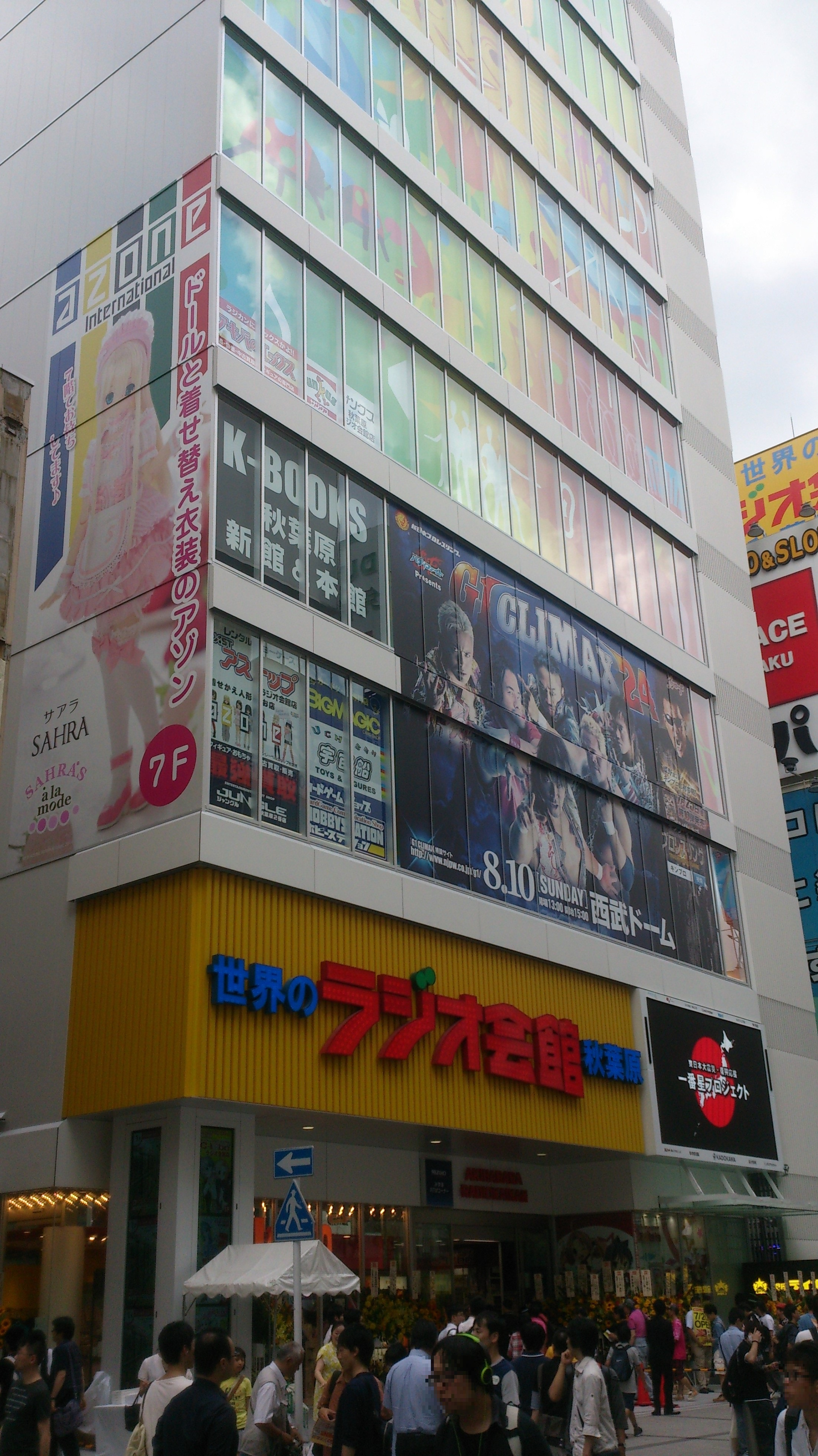 秋葉原ラジオ会館（2代目）の外観。